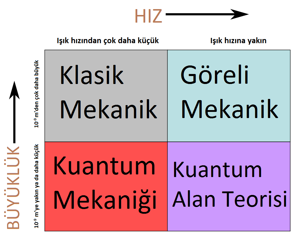 Resmin orijinalinden Türkçeleştirdim.